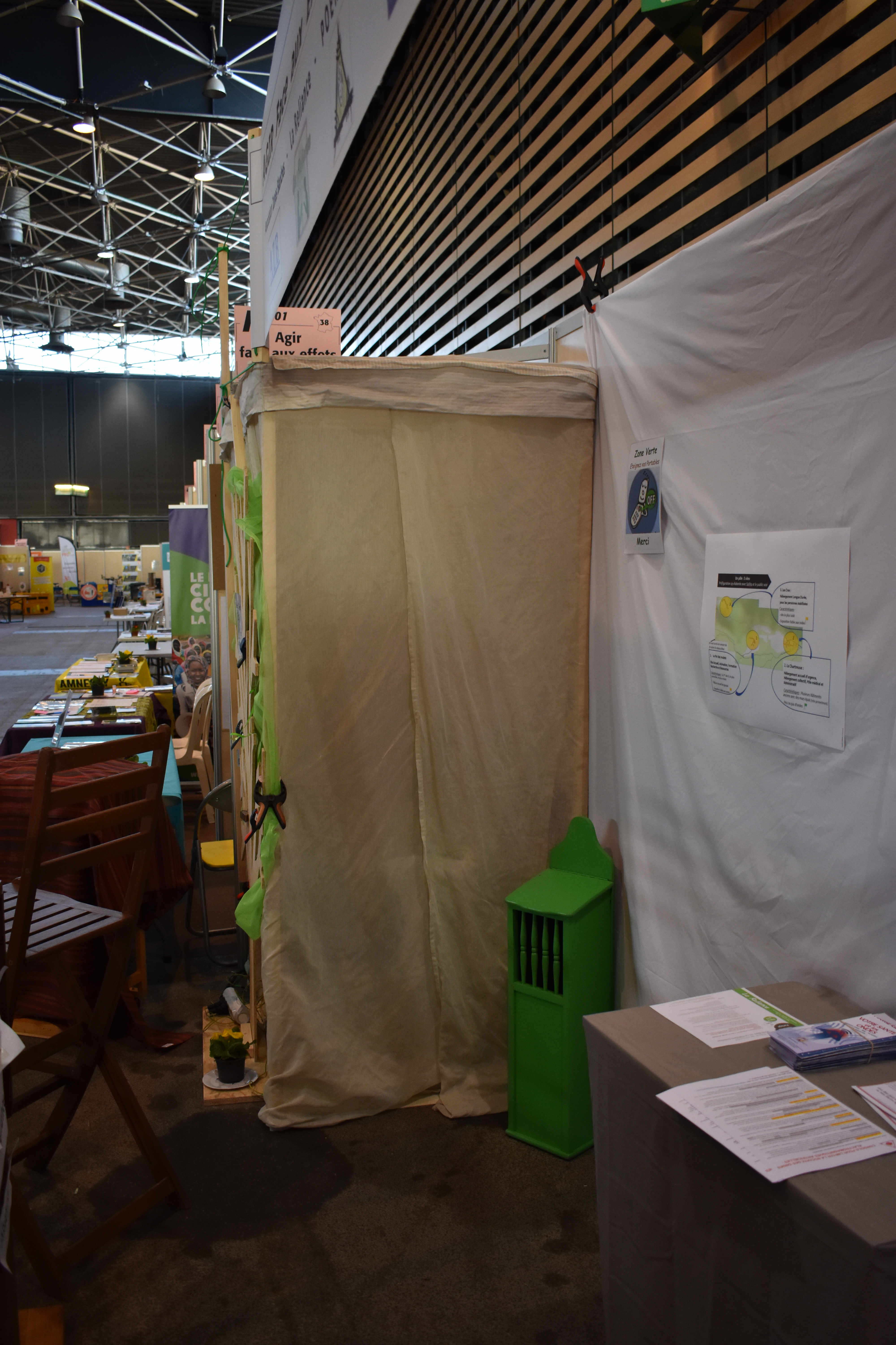 Tente anti-ondes à Primevère 2019.